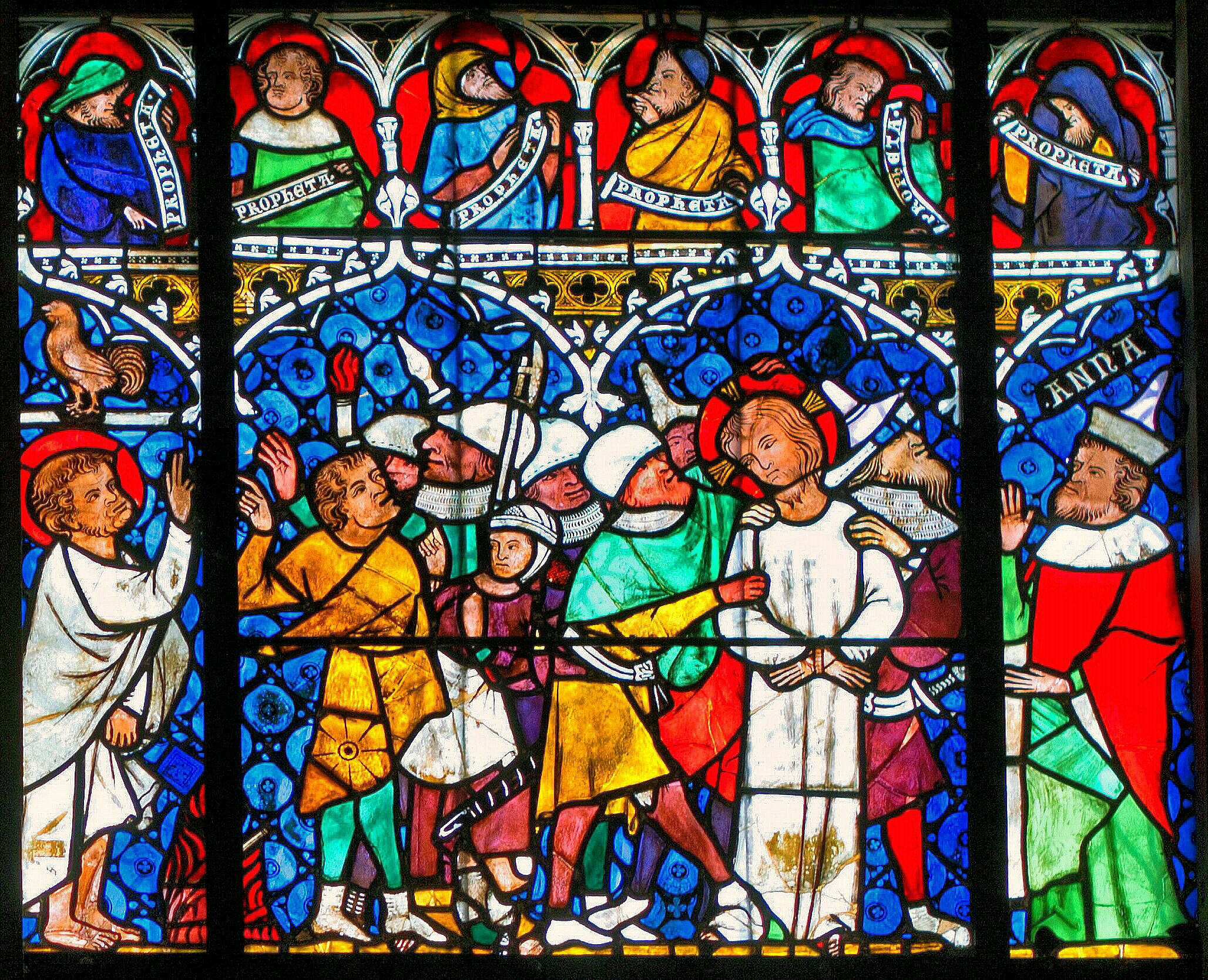 Petrus und der Hahn; Jesus vor Annas. Südliches Seitenschiff, 3.Fenster, 6.Scheibe (Passionsfenster)